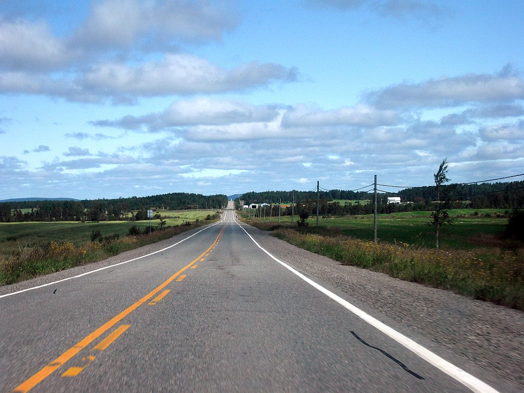 Vue sur la route 111, à Authier, en Abitibi.